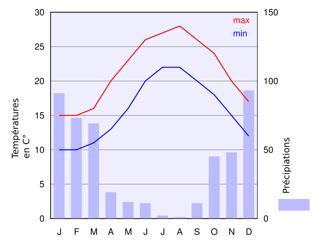 Diagramme climatique de Naxos (version française)